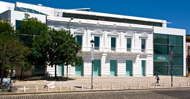 Fachada del edificio de Fundación Proa, La Boca